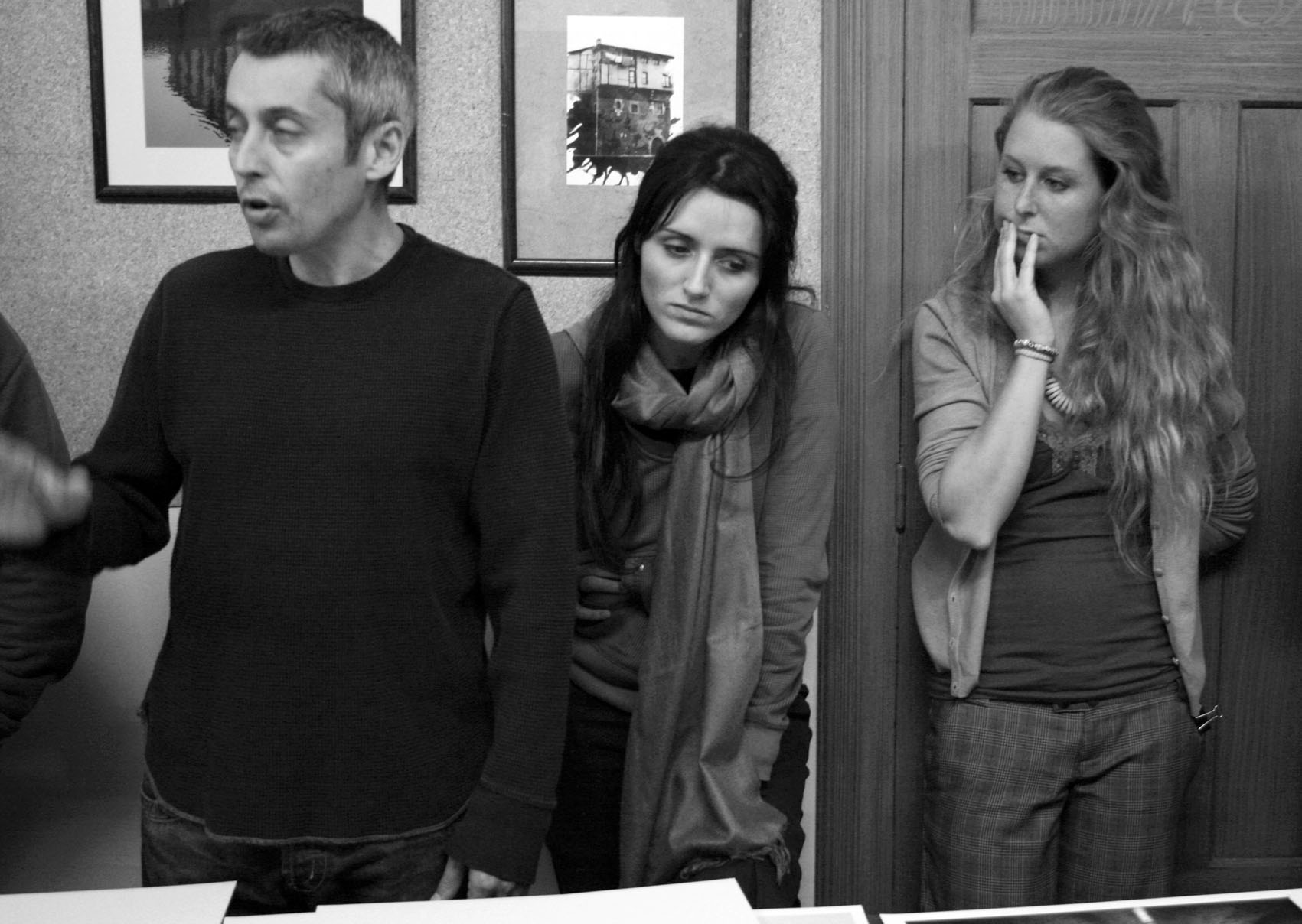 El fotógrafo Ricky Dávila impartiendo un taller en Vitoria (España).